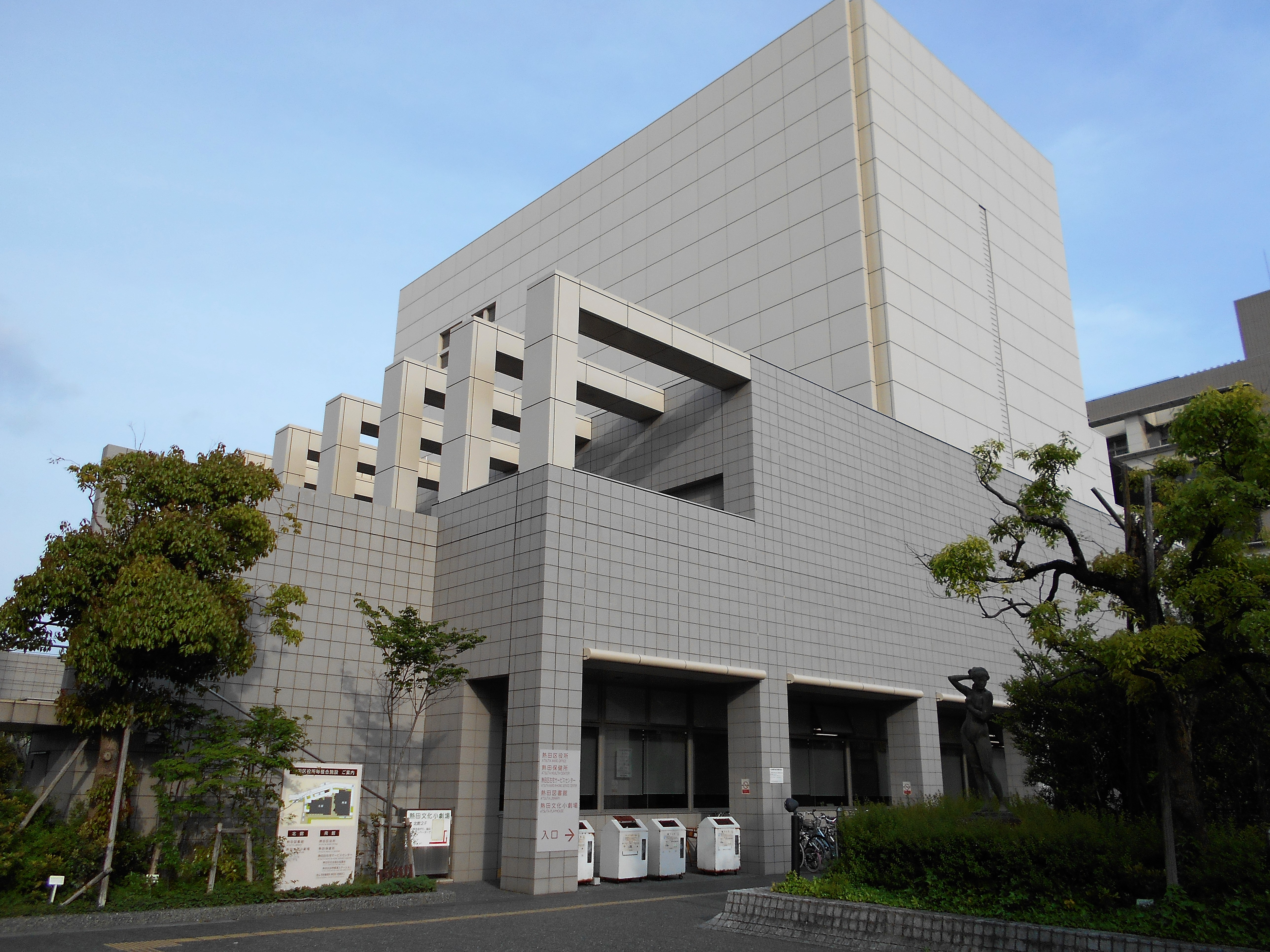 愛知県名古屋市熱田区にある、熱田区役所等複合施設（あったかプラザ）。1階に名古屋市熱田図書館、2階に熱田文化小劇場が入っている。